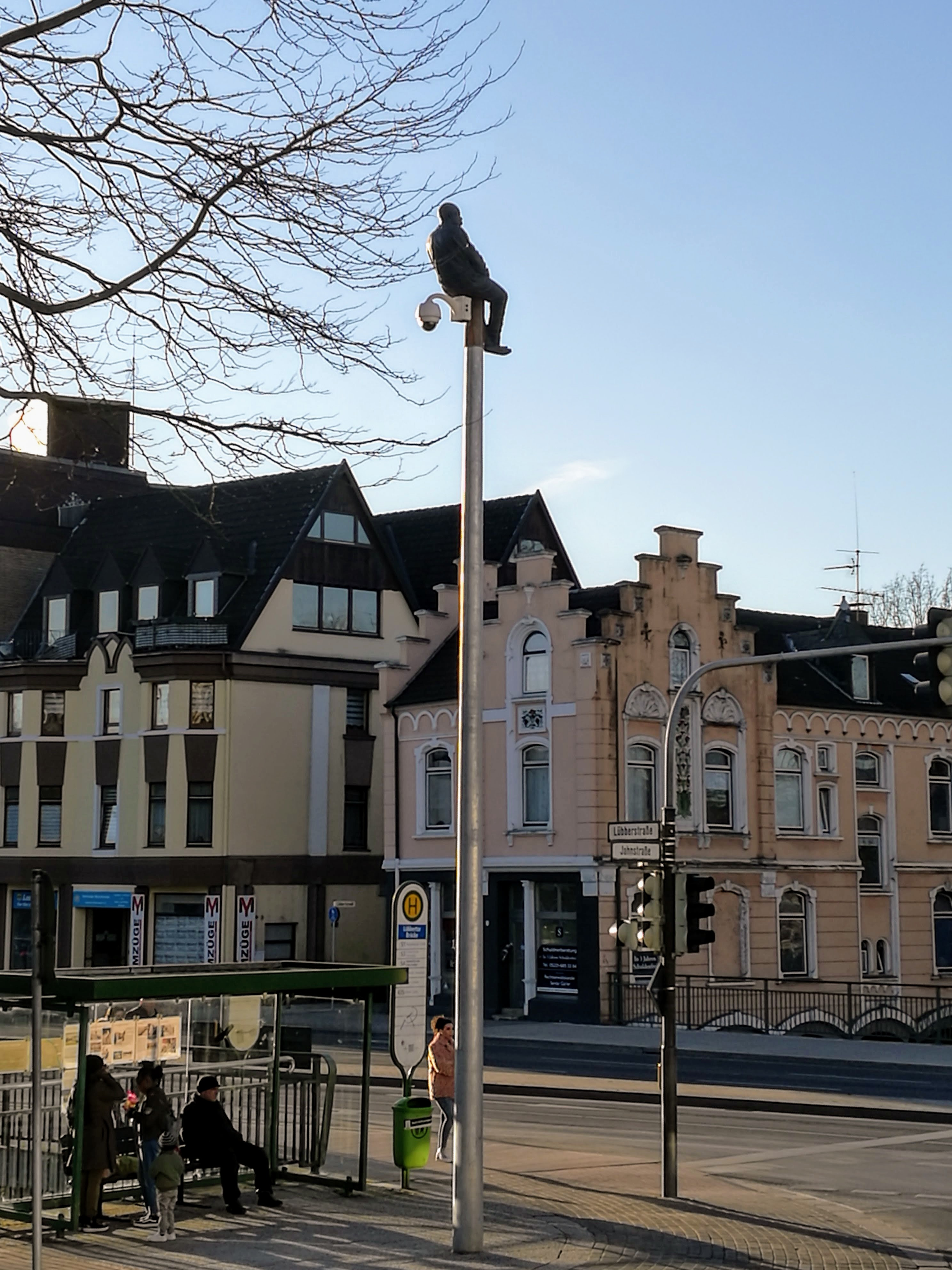 Skulptur "Melilla Mauerspringer" des spanischen Künstlers Fernando Sánchez Castillo